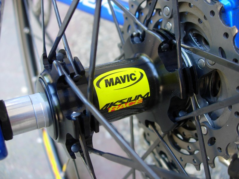 Rueda Trasera Mavic